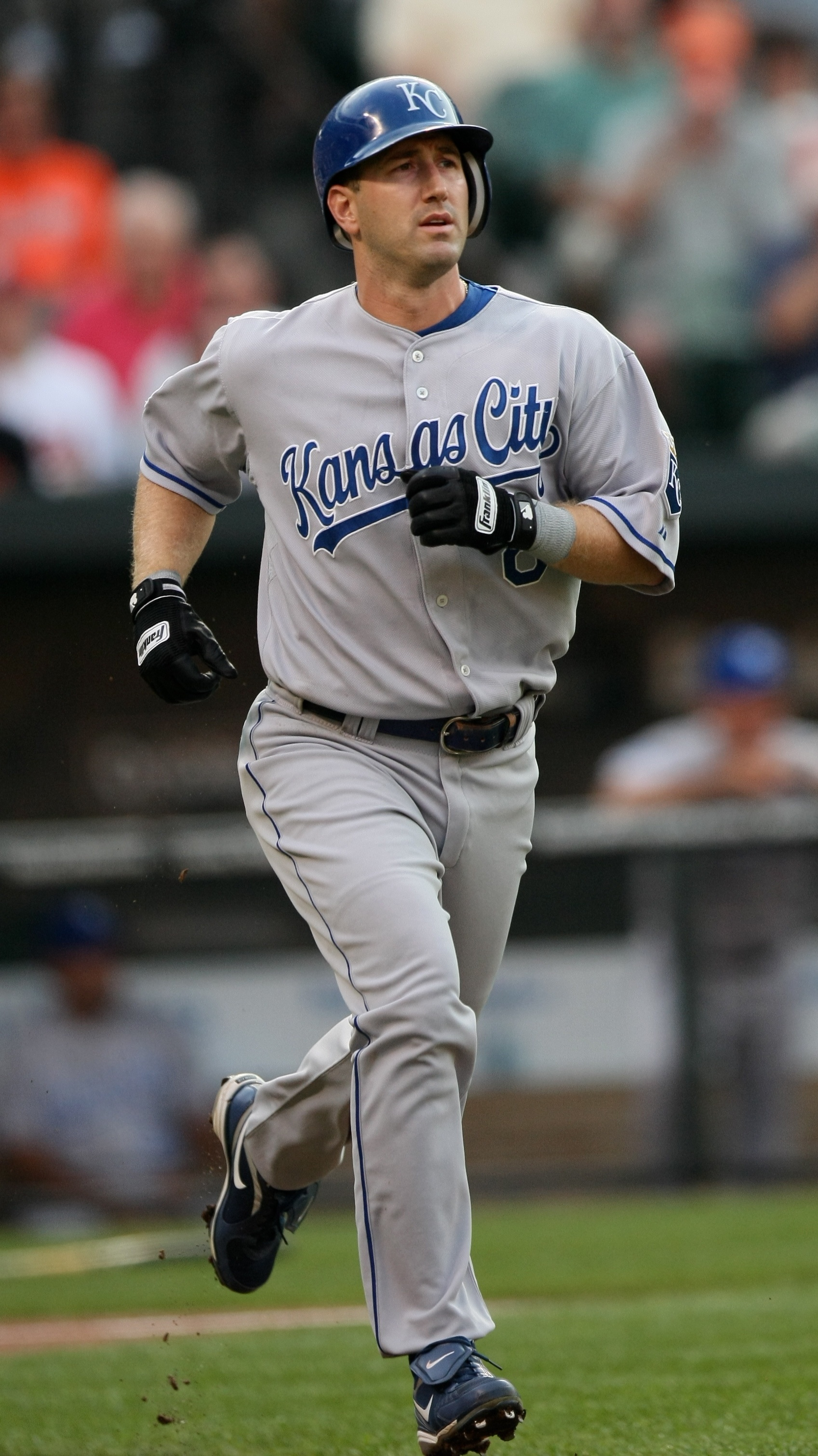 Willie Bloomquist